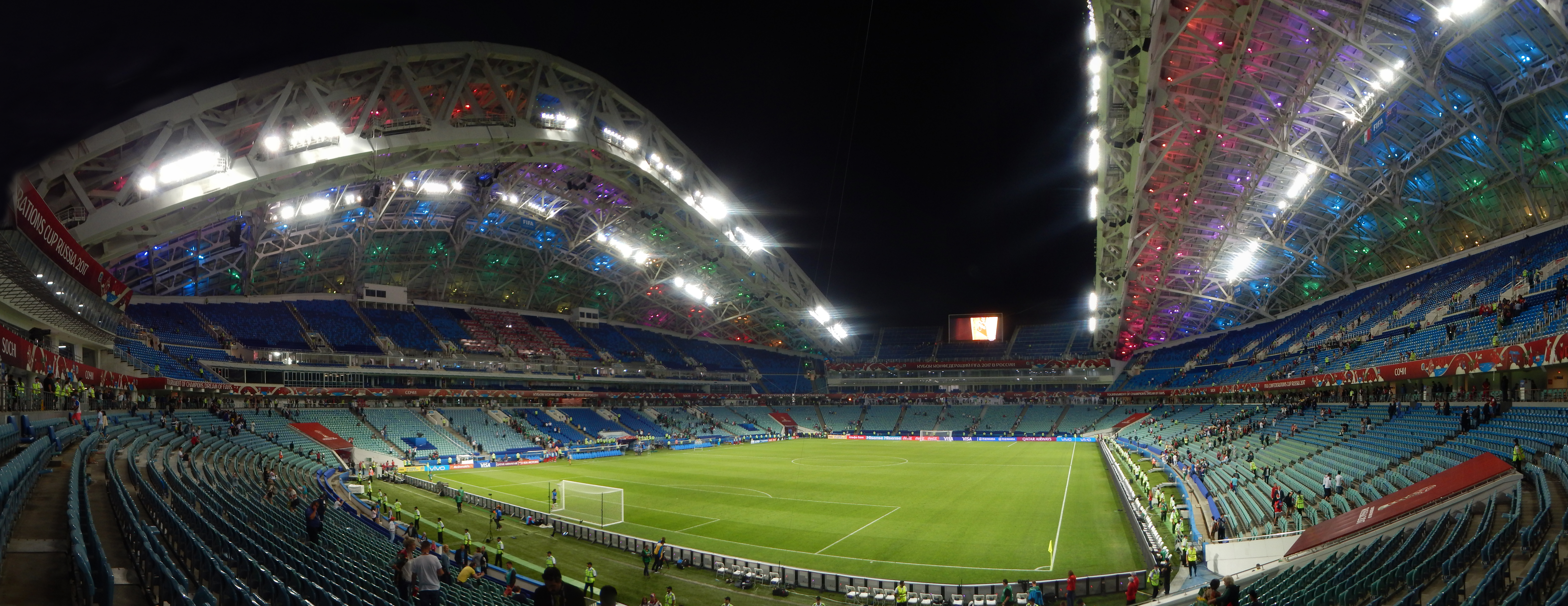 Стадион Фишт во время Кубка Конфедераций 2017, вид с трибуны D